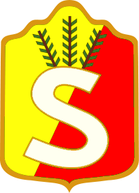 Vaasan suojeluskuntapiirin (Vasa skyddskårsdistrikt) käsivarsikilpi.